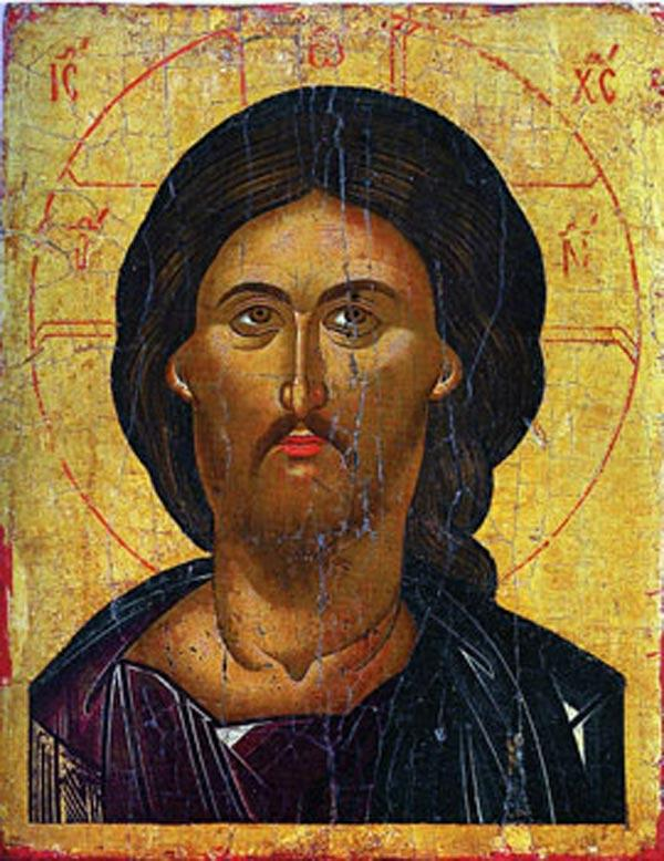 Господь Вседержитель. Середина XVI в. Крит Музей имени Андрея Рублёва